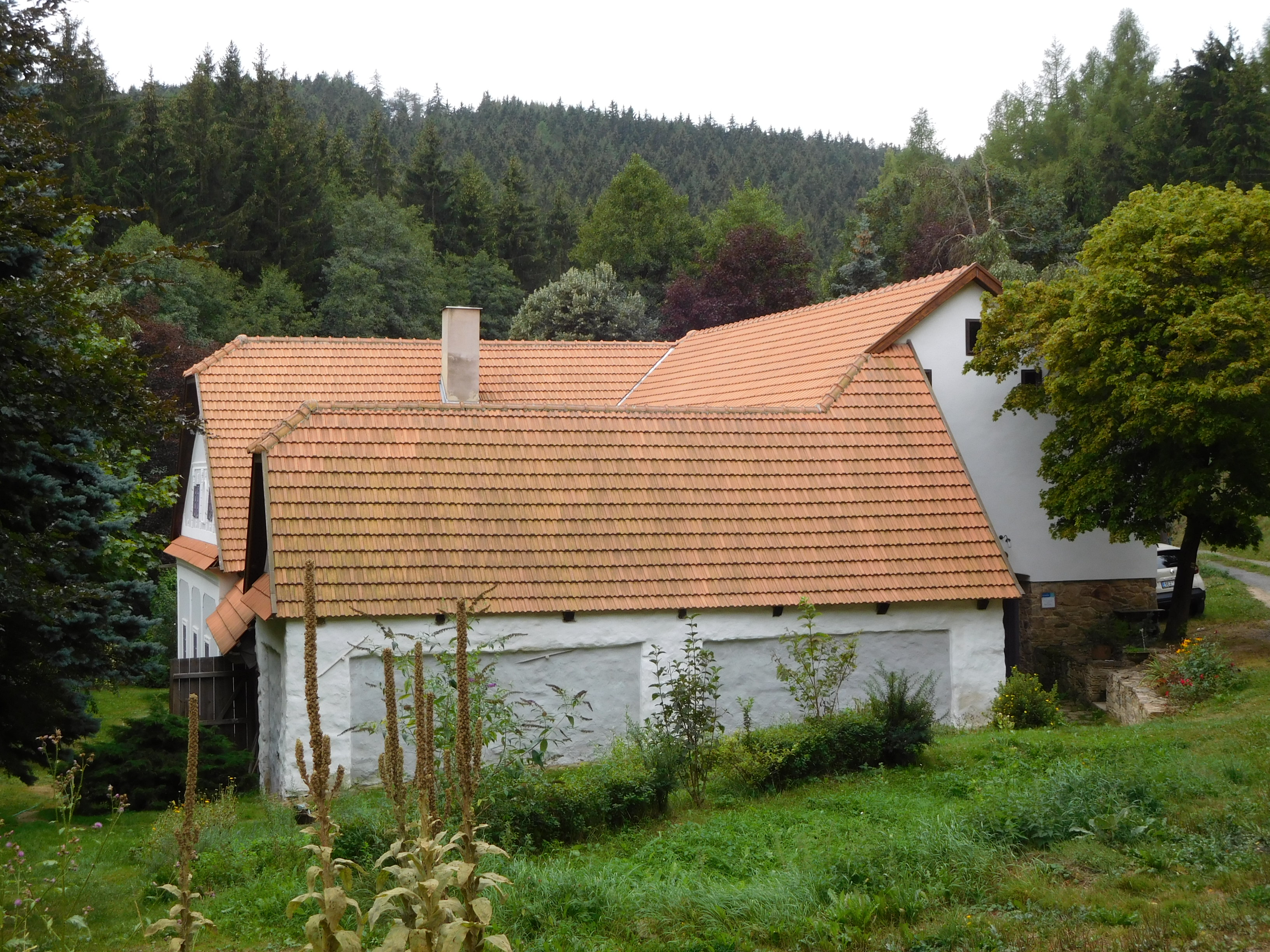 Trhonice - č.p. 15, mlýn